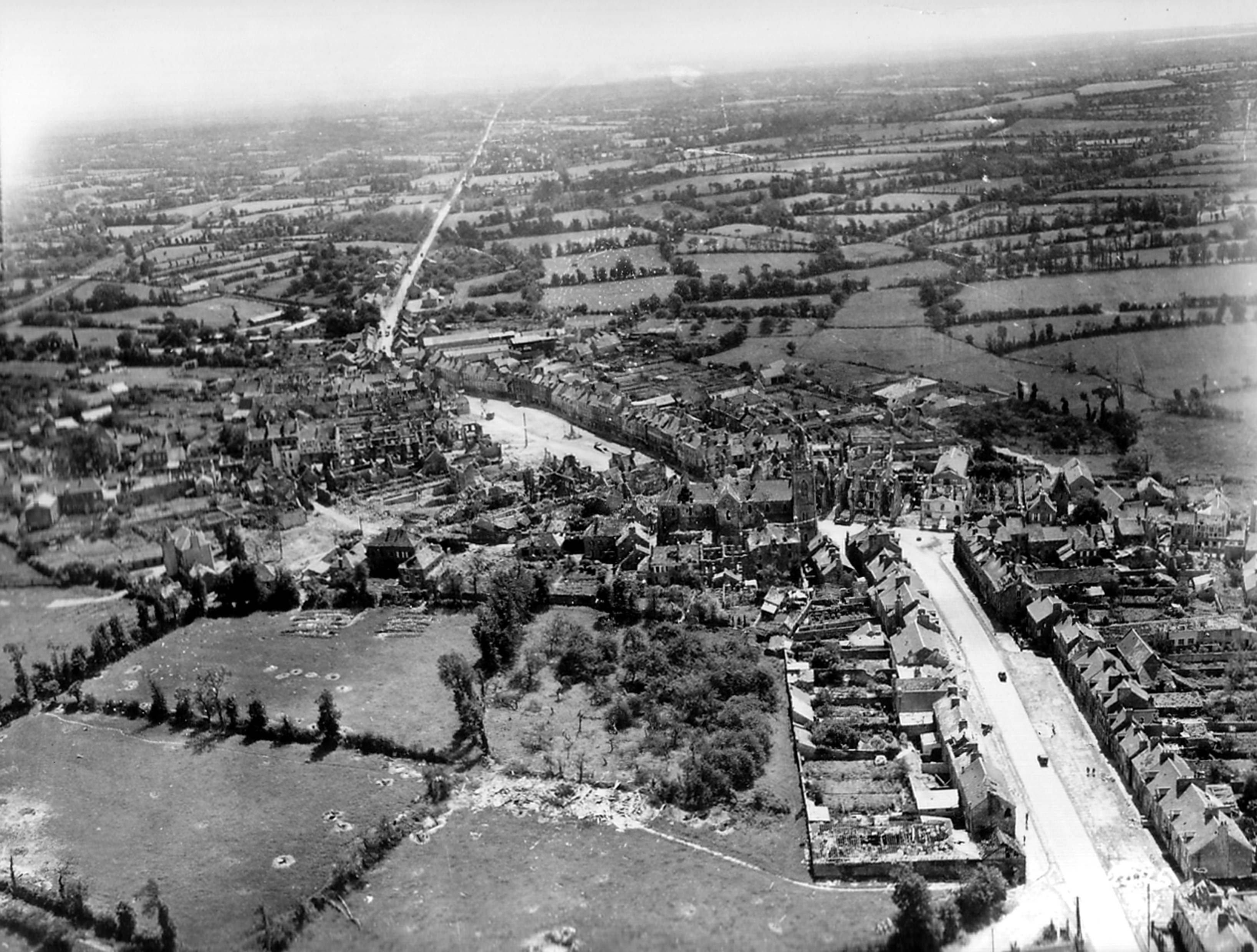 Vue aérienne de la zone du bocage autour des ruines de l'Haye-du-Puits. On peut distinguer en haut à droite du cliché le Havre de Saint-Germain-sur-Ay. De part et d'autres de la départemental, le bocage propre à la guerre de Haies de 1944. On distingue en zoomant les zones de combats (halo de fumée). Les Bloody Hill se trouvent également en haut à droite du cliché.